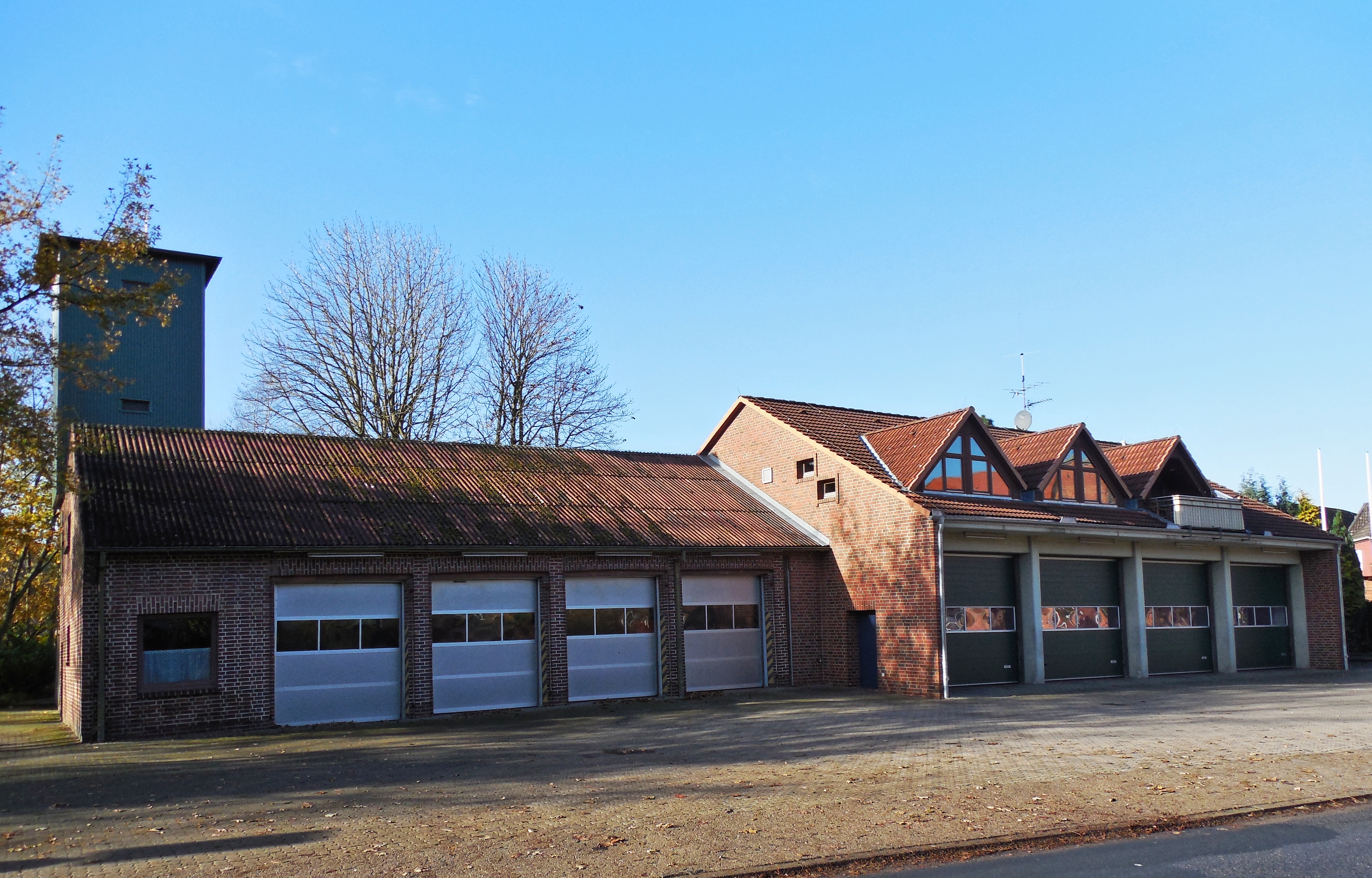 Feuerwache